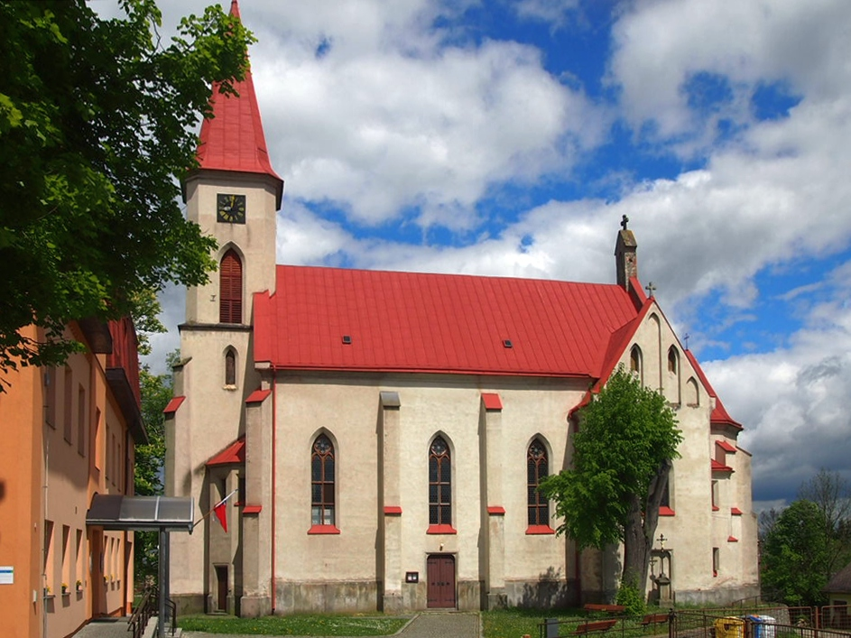 kostel sv. Bartoloměje opata v Herálci (HB)